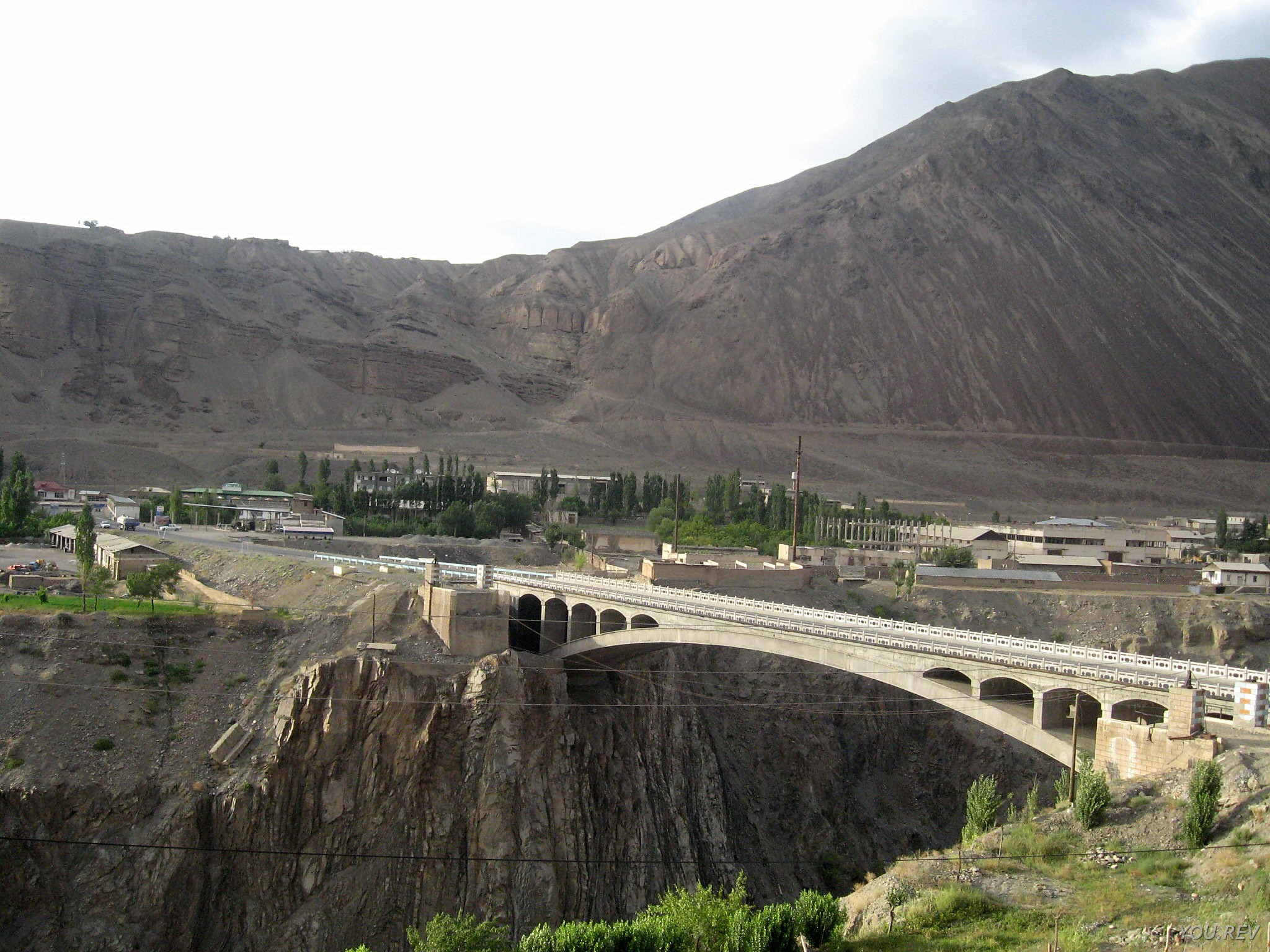 Мост через реку Зеравшан в пос.Айни